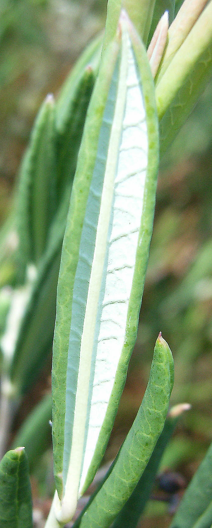 Blattunterseite der Rosmarinheide (Andromeda polifolia), Nordwestdeutschland